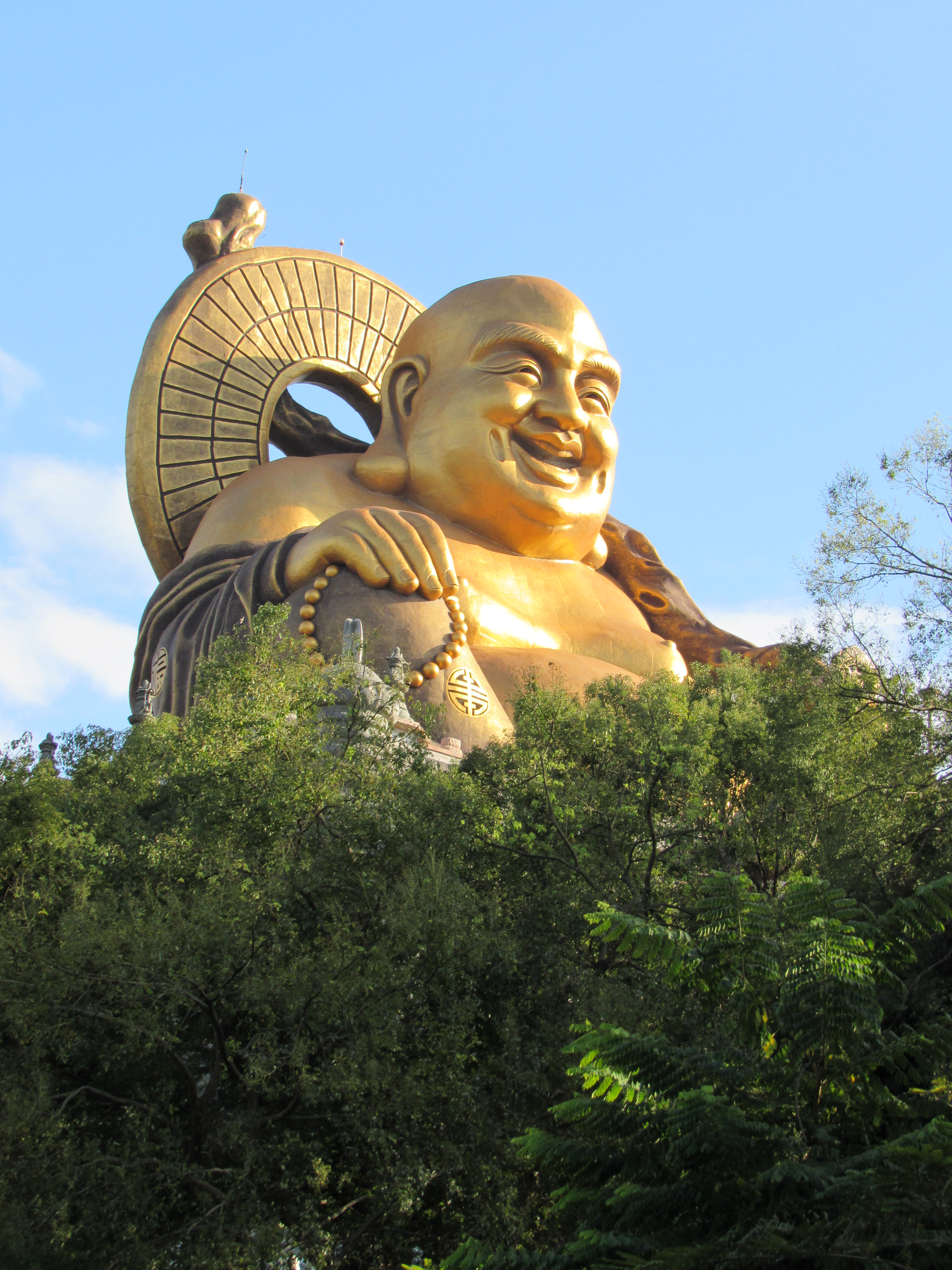 中文（台灣）: 湖山寺的彌勒佛